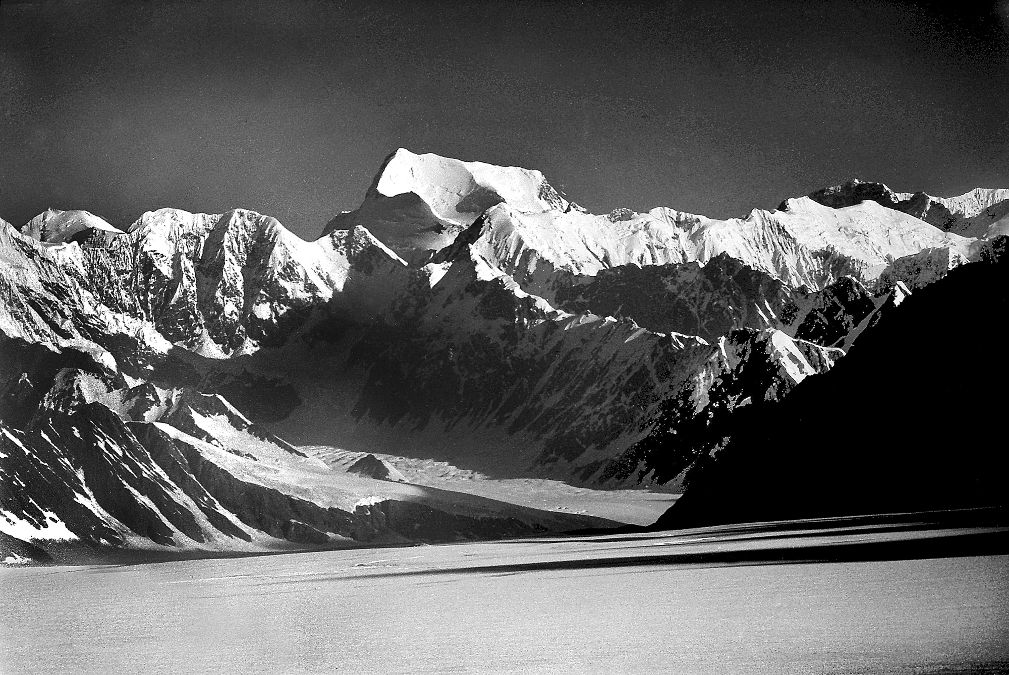 Ekspeditsioon mäetipule "Tartu Ülikool 350". Kommunismi põhjanõlv.